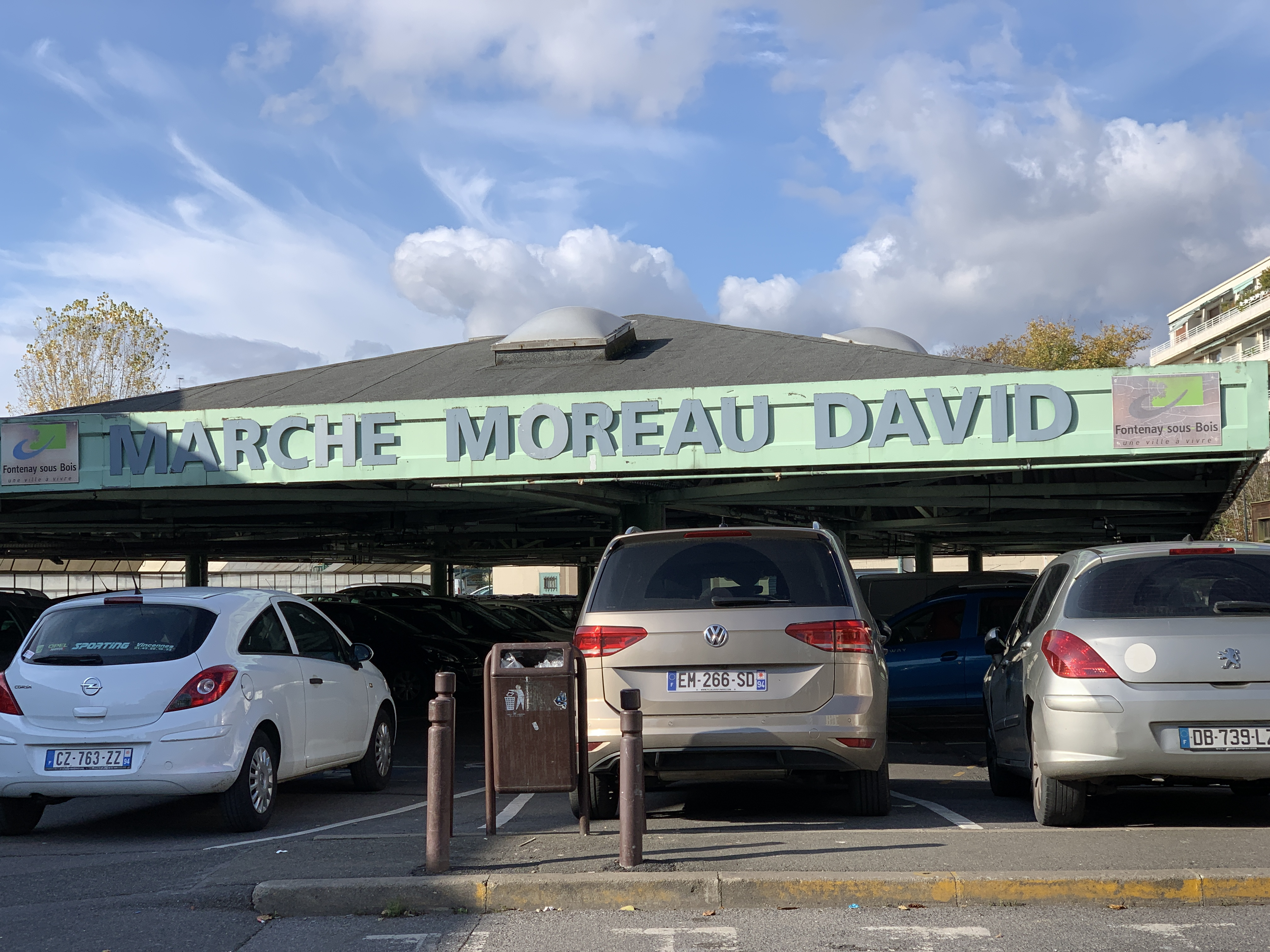 Marché Moreau David, Fontenay-sous-Bois.